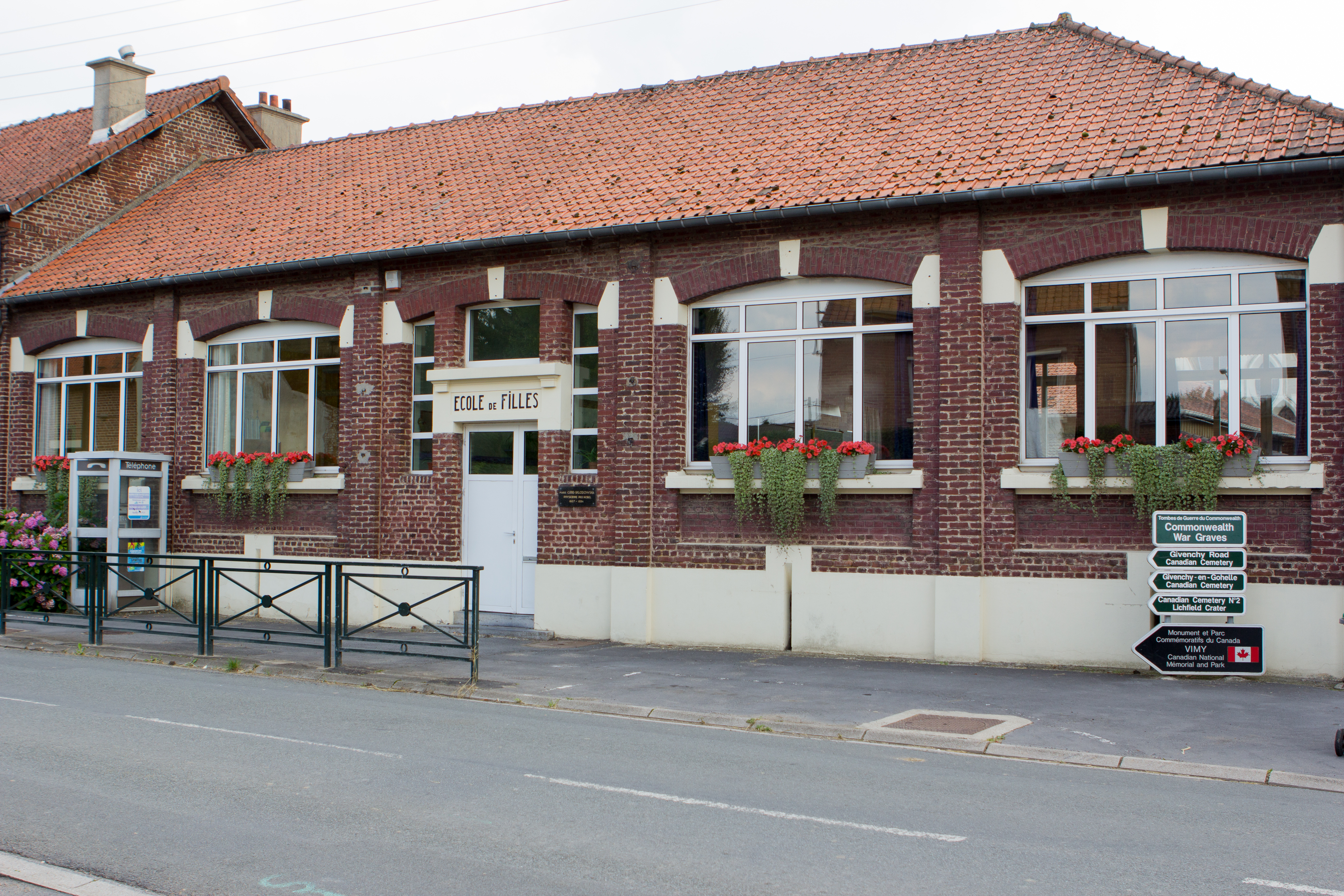 Ecole Marie-Curie de Neuville-Saint-Vaast / Neuville-Saint-Vaast, Pas-de-Calais, France